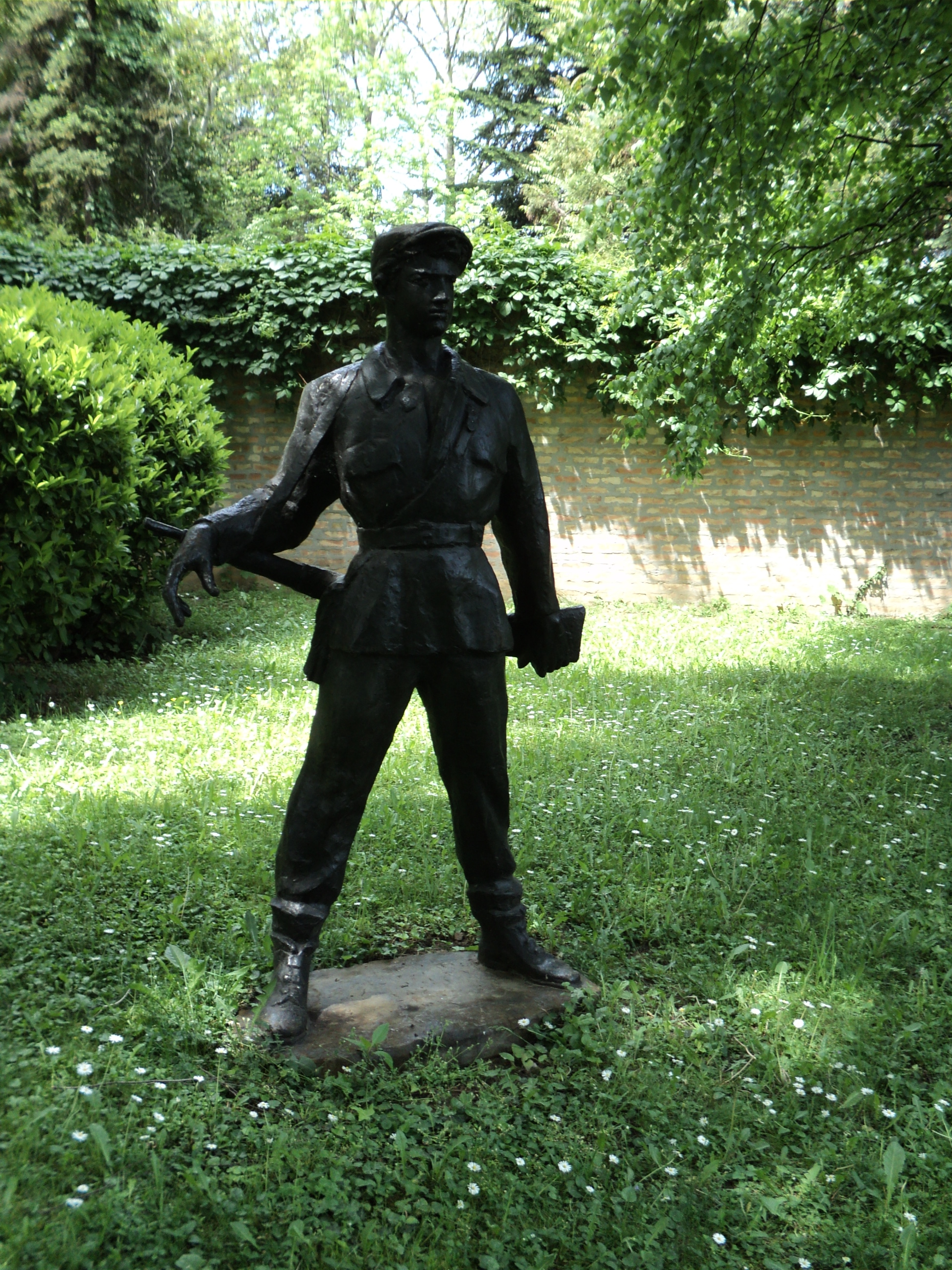 Spomenik "Kurir", rad vajara Stevana Bodnarova iz 1953. godine; lokacija: Beograd, muzej "25. maj". Self-made. Maj 2011.